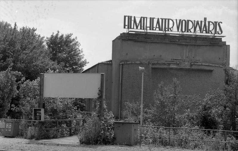 22.7.1991 Berlin-Karlshorst, Filmtheater "Vorwärts"